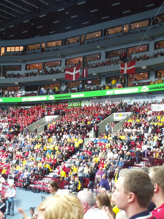 Aspecto del Malmö Arena durante la final entre Francia y Dinamarca